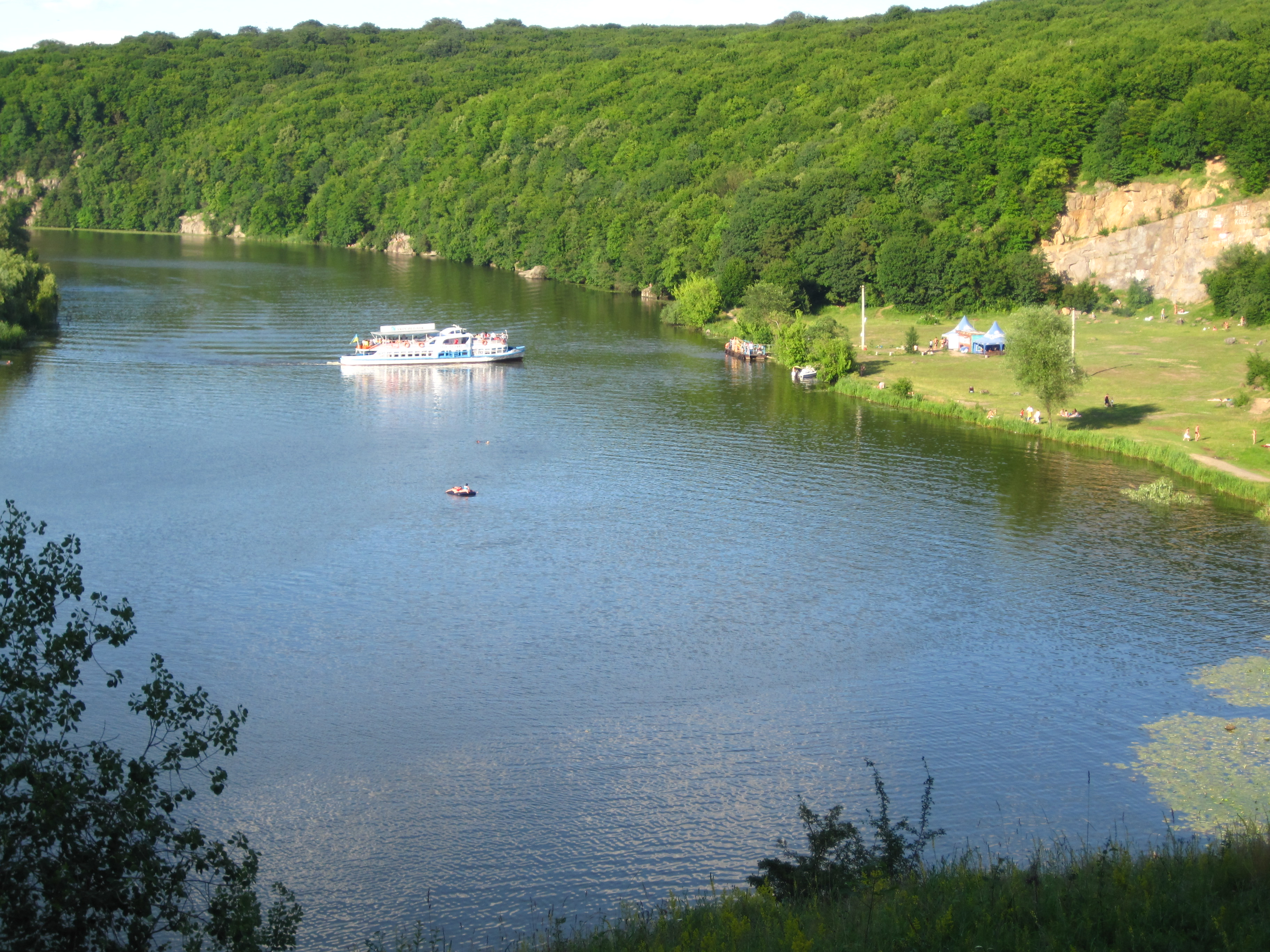 Вигляд на головний пляж